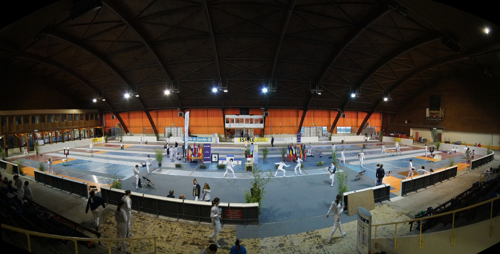 La Halle Clemenceau, ancienne patinoire de Grenoble, sert à diverses activités sportives, l'escrime par exemple (FLEUR'ISERE, GUC-Escrime)